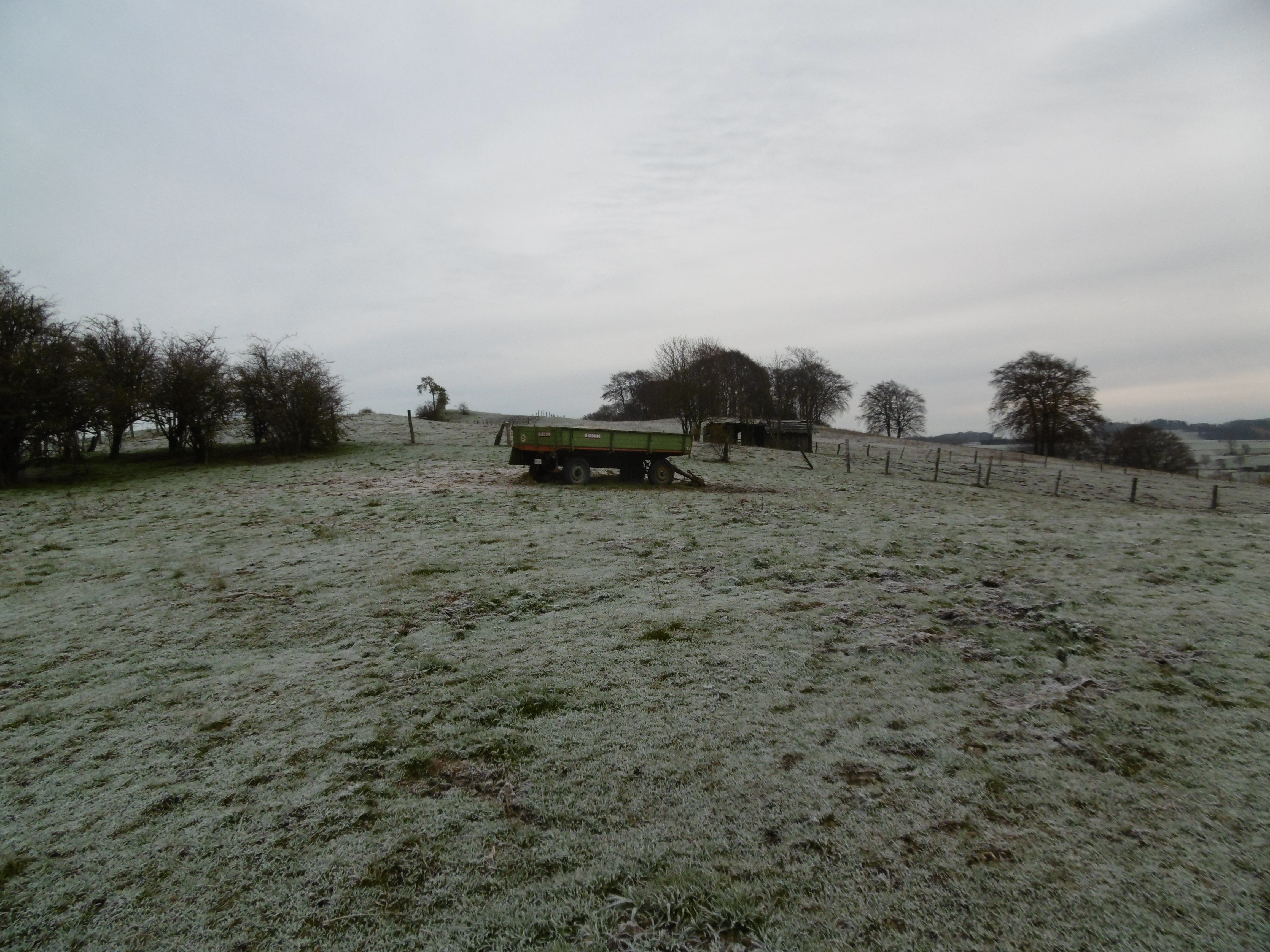 Bergkuppe Naturschutzgebiet Feldberg (Brilon, HSK-512).